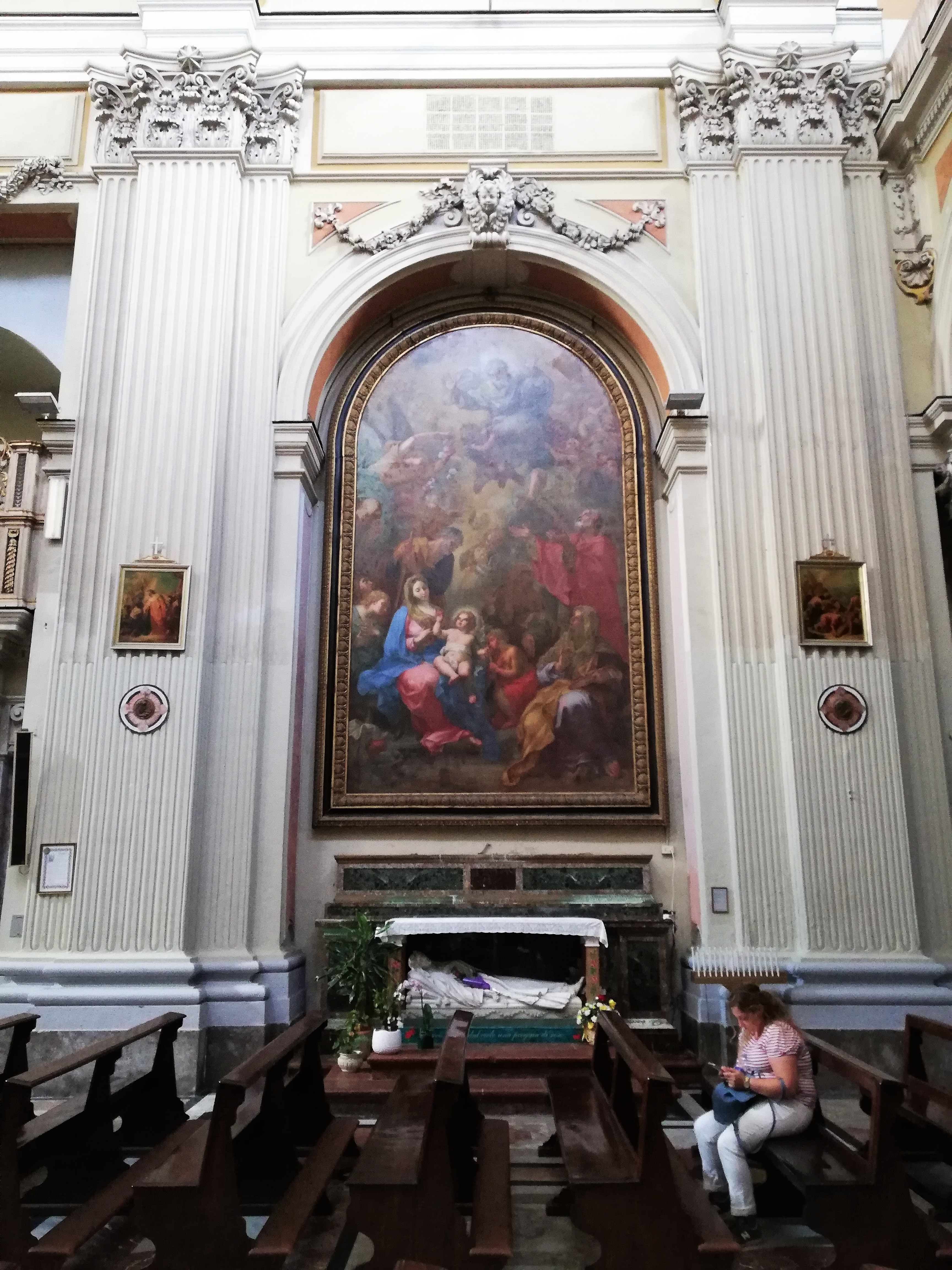 Altare laterale destro. Cappella della Sacra Famiglia. Dipinto di Giovanni Odazzi.